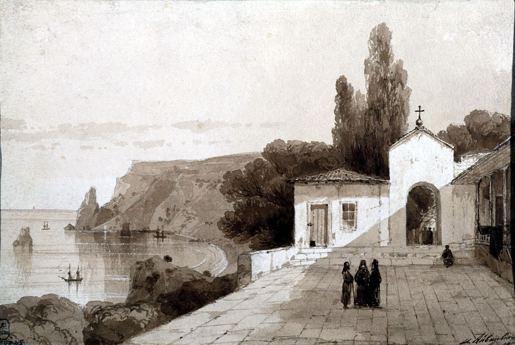 Вид Георгиевского монастыря. 1858 Бумага, сепия.14х21,1см. Государственный Русский музей, Санкт-Петербург